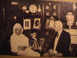 le sultan Mohammed chez le maréchal Lyautey